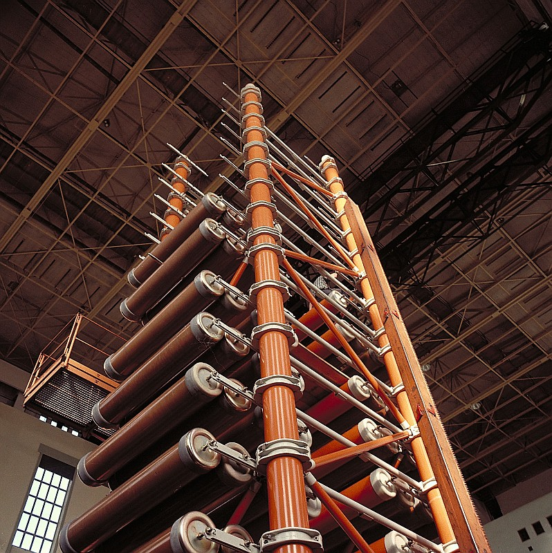 Original image description from the Deutsche Fotothek VEB Transformatoren- und Röntgenwerk Hermann Matern Dresden